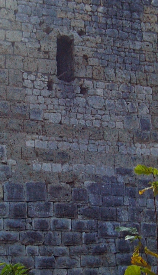 Hocheingang mit Befestigungsstellen deutlich zu erkennen.